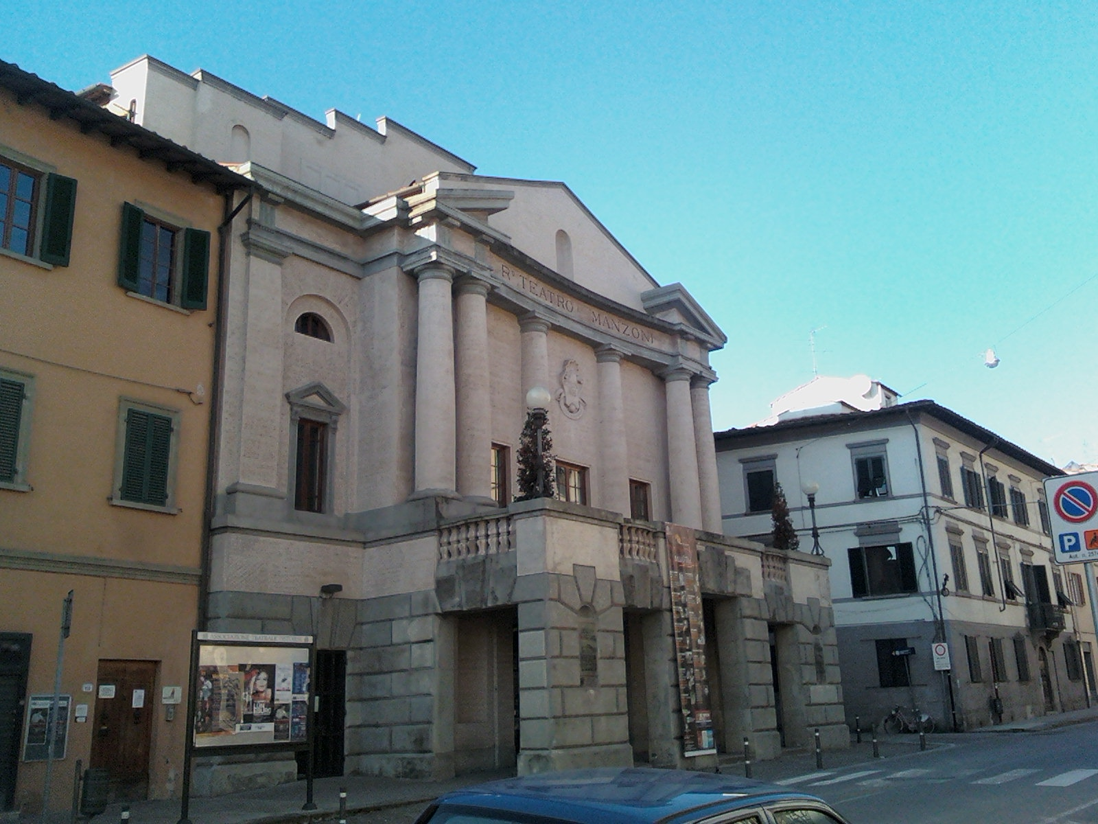 Veduta del teatro Manzoni di Pistoia